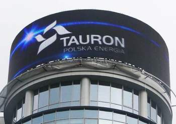 Telebim LED w Katowicach na budynku Tauron.